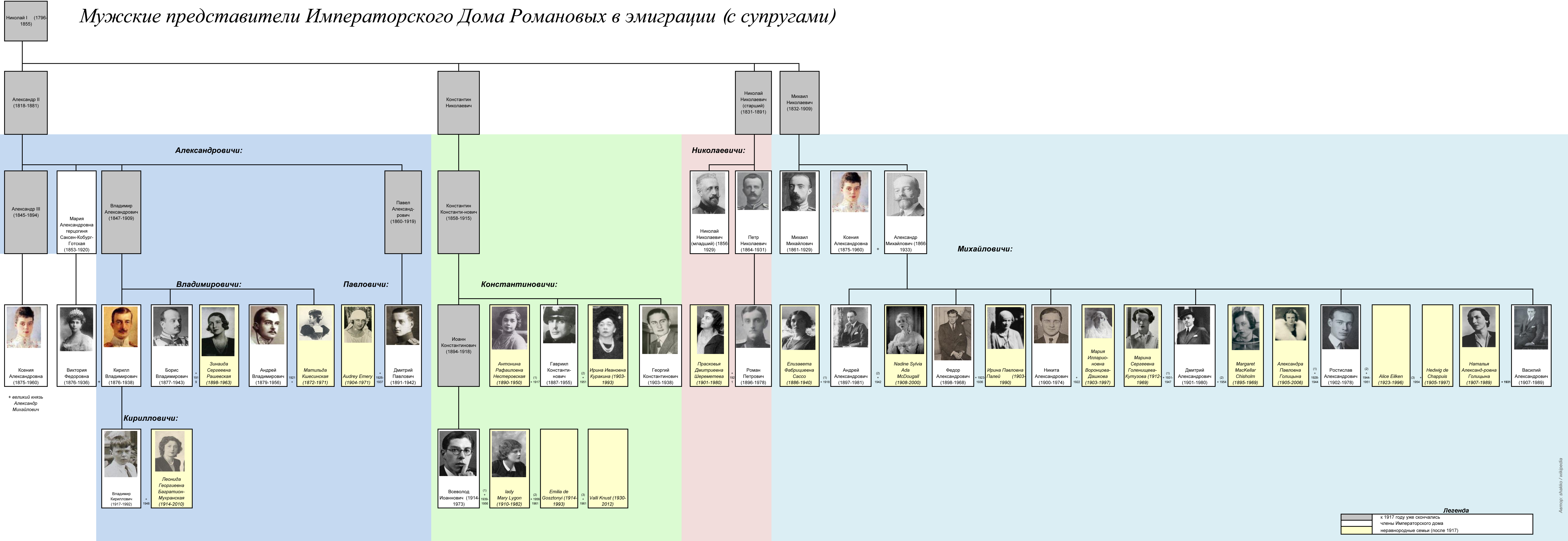 Генеалогическое древо дома Романовых. Мужские представители Императорского дома Романовых, оказавшиеся в изгнании, и их супруги - в большинстве случаев неравнородные, от браков, заключенных в эмиграции